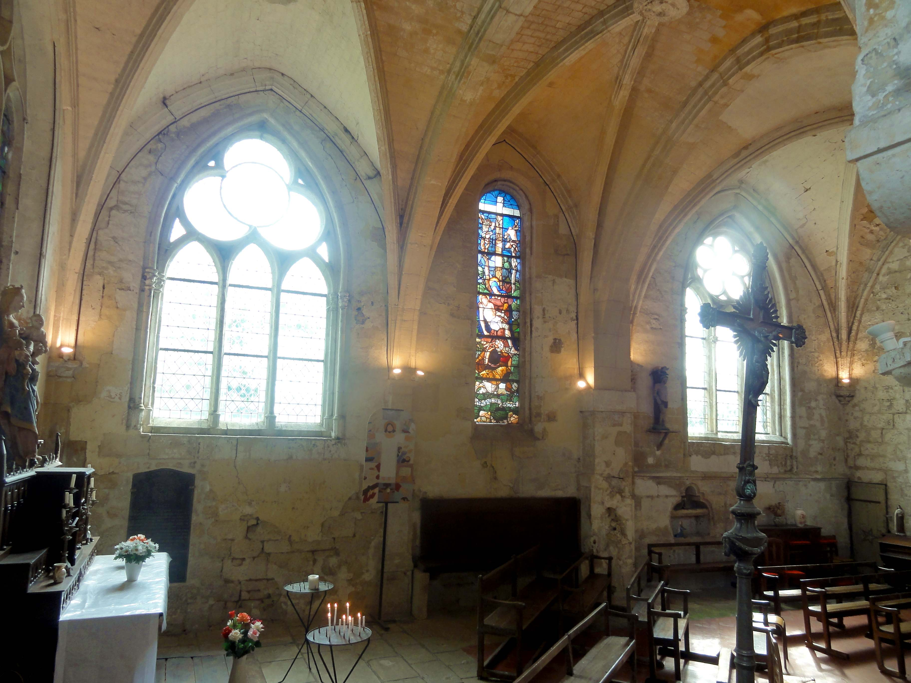 Chapelles sud, vue vers le sud (au milieu le croisillon sud).